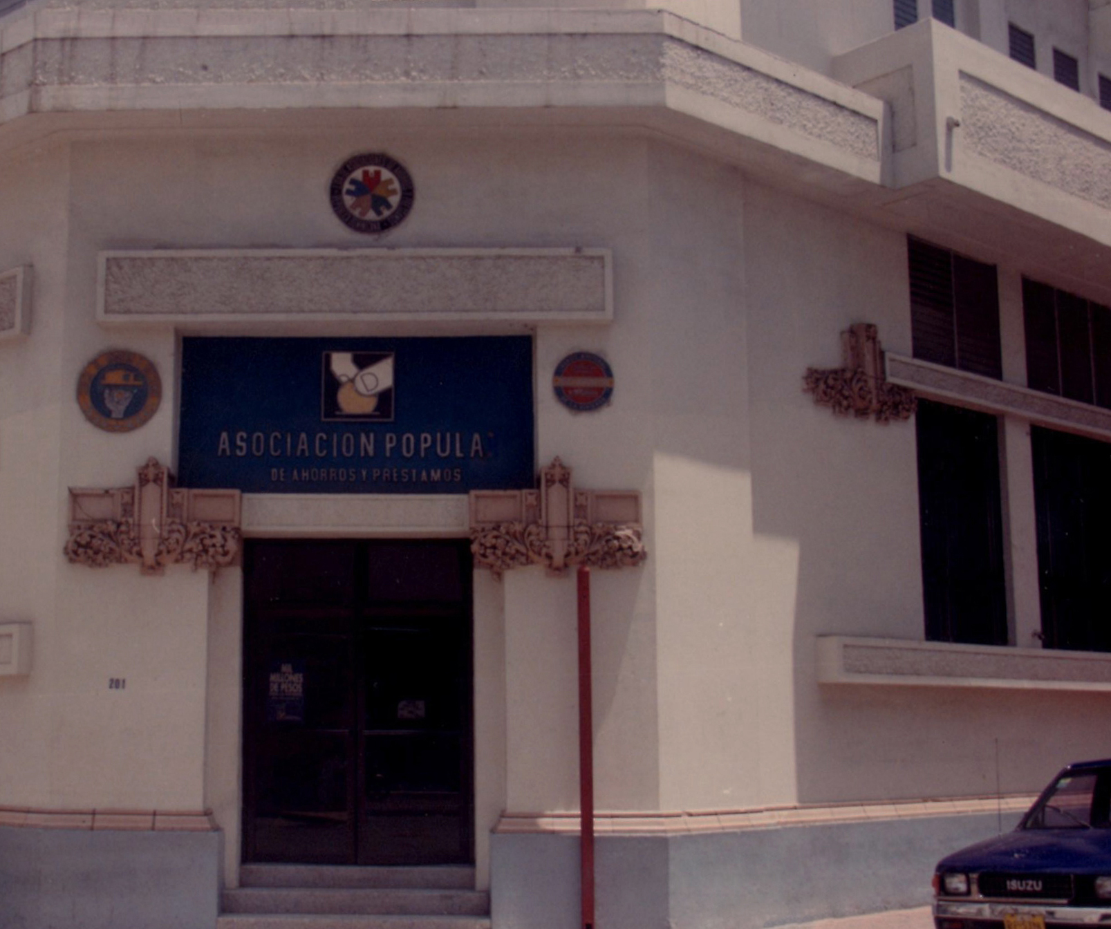 APAP abrió sus puertas el 29 de julio de 1962 en la calle Isabel la Católica esquina calle Mercedes en la Zona Colonial de Santo Domingo.